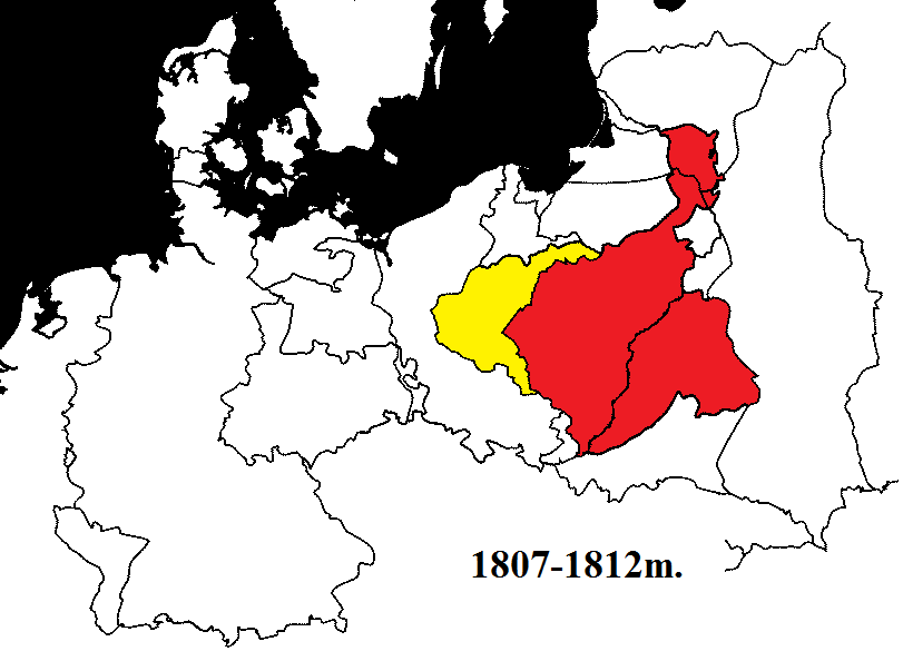 Varšuvos kunigaikštystė, įkurta Napoleono po laimėto karo su Prūsija